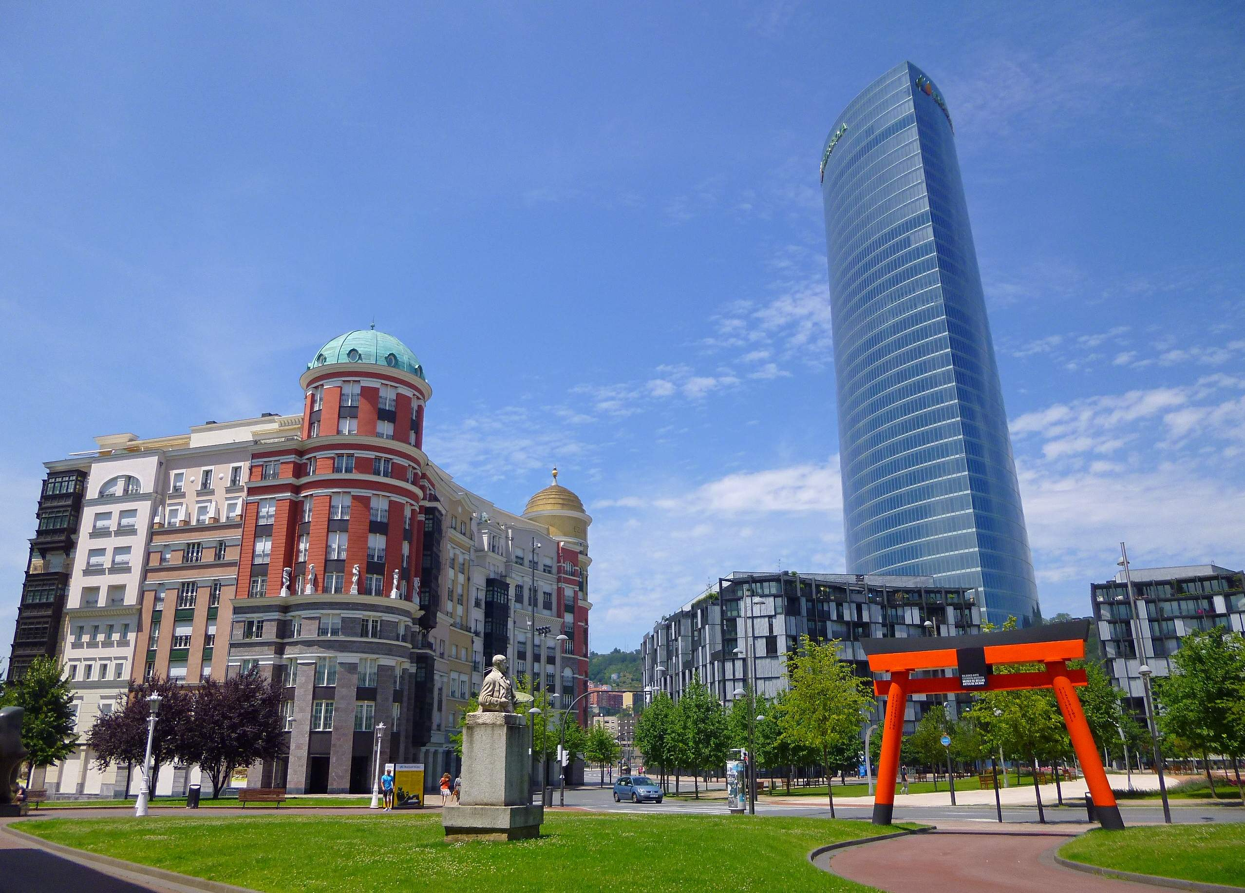 Plaza Euskadi de Bilbao. A la derecha de la imagen se yergue la Torre Iberdrola y a la izquierda aparece el Edificio Artklass